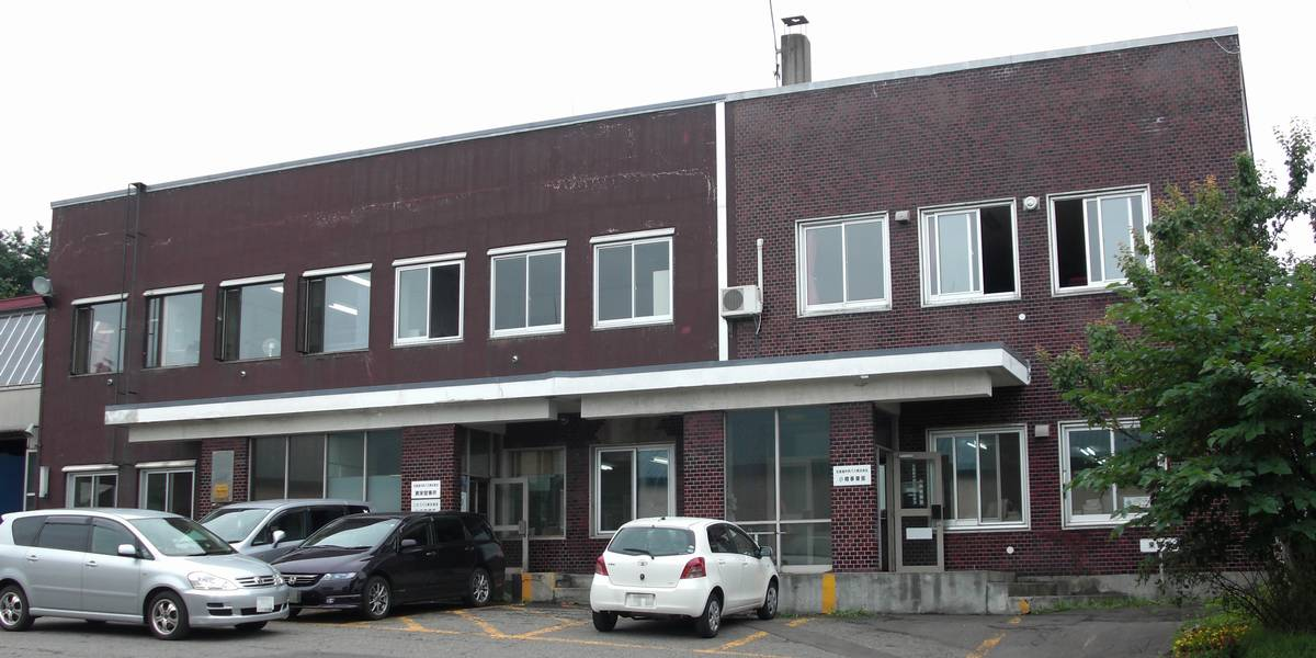 Hokkaidō Chūō Bus Masakai office